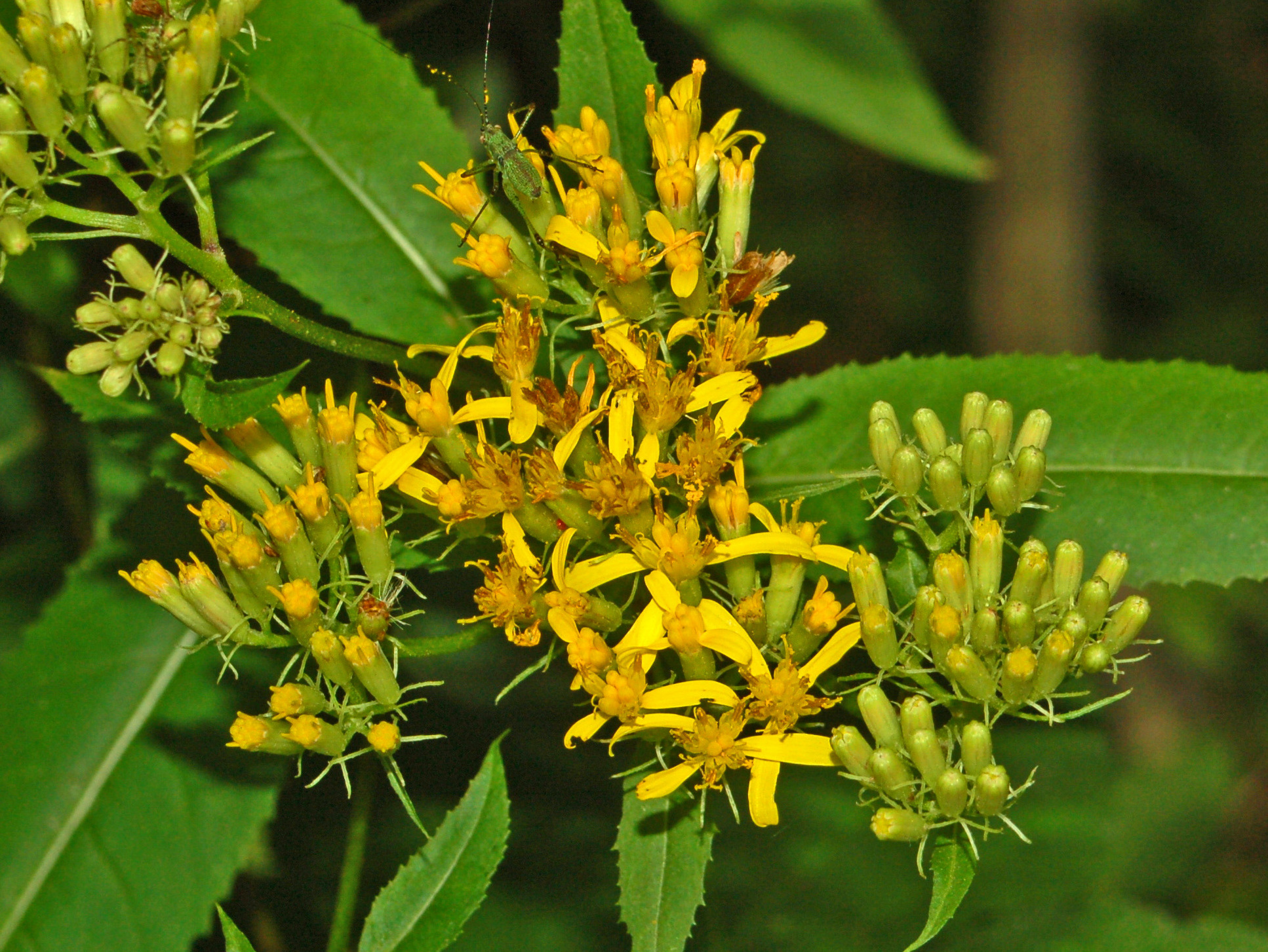 Senecio ovatus, Genoa, Italy